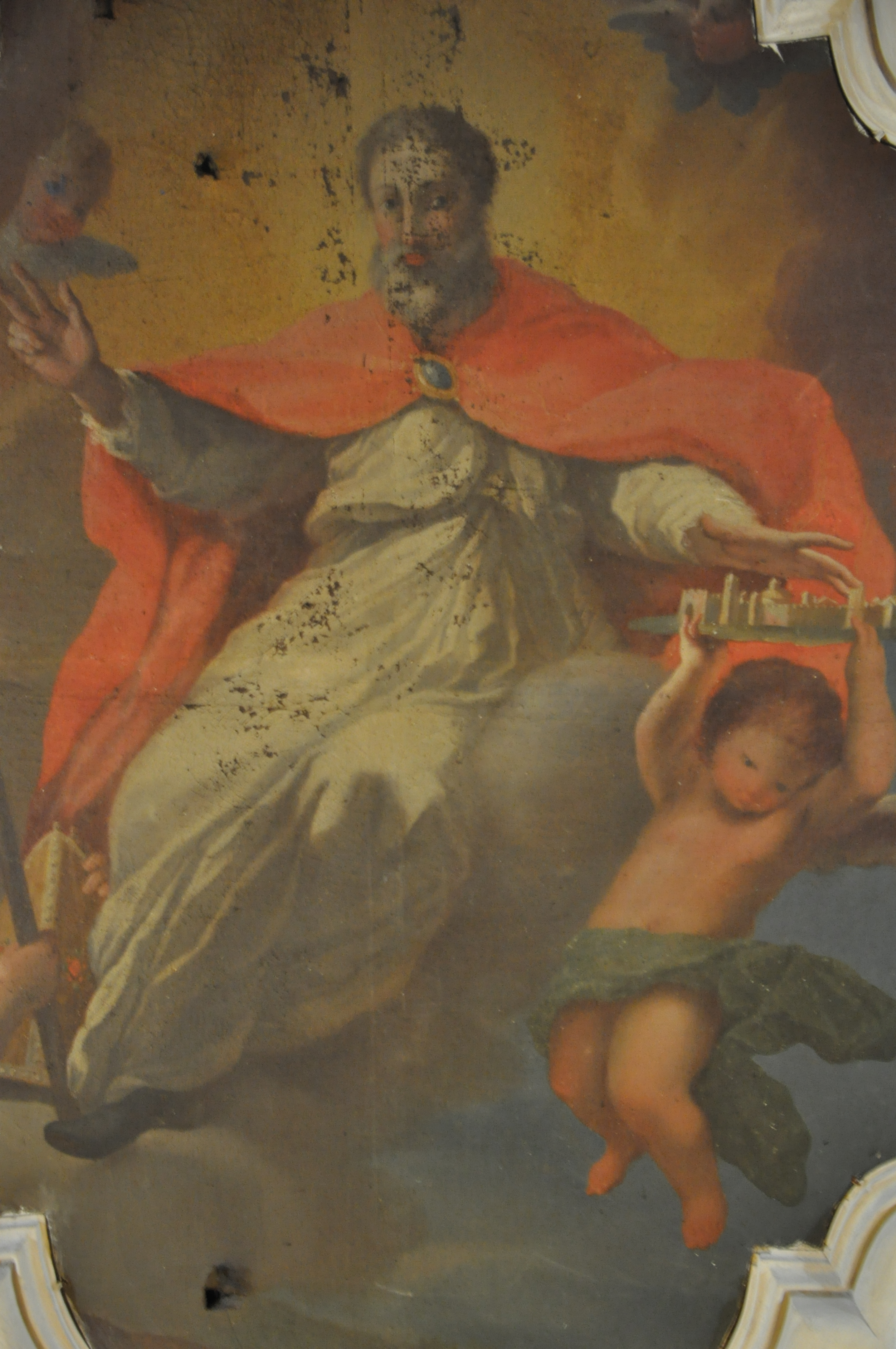 San Vivenzio Benedicente